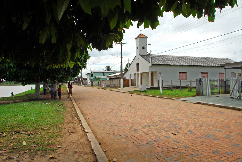 Igreja em Santa Rosa do Purus - Acre. Saiba mais